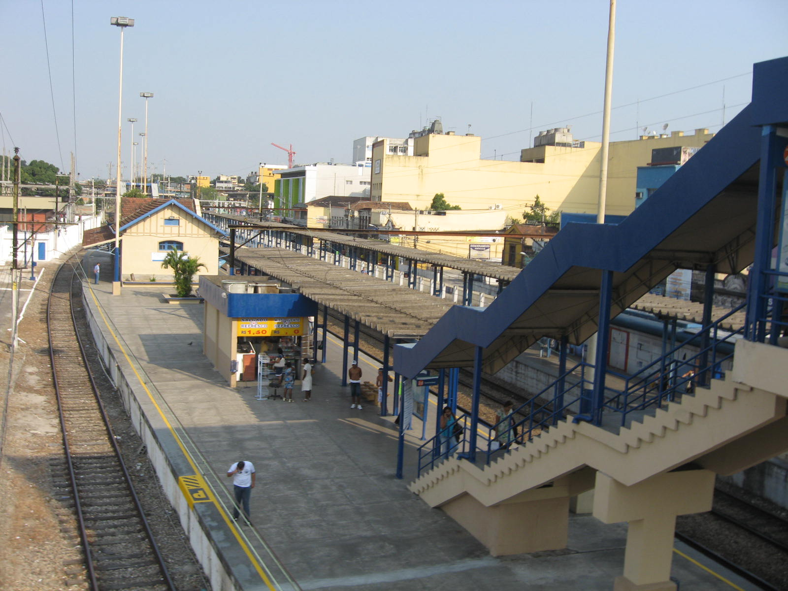 Vista da estação de Nilópolis, na Baixada Fluminense, RJ.